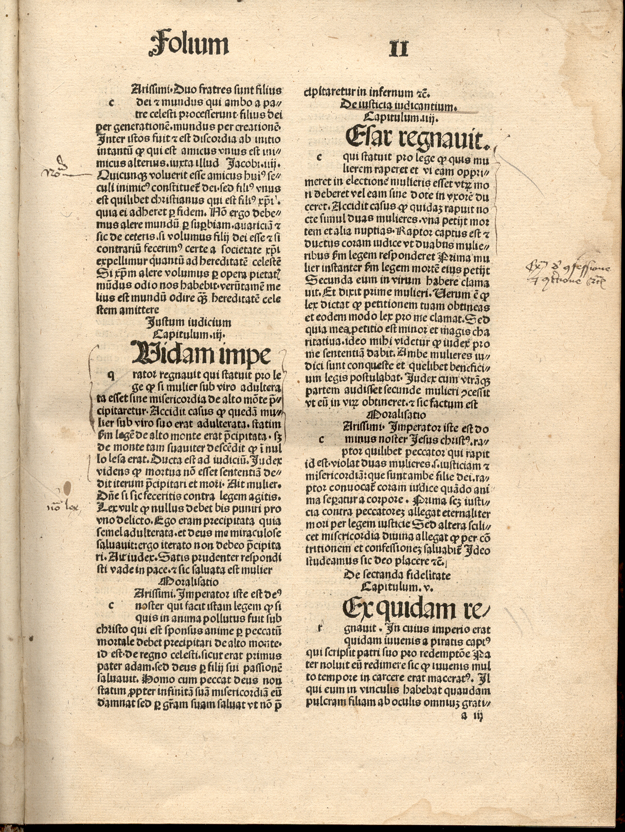 Gesta Romanorum, Fol. II r (GW 10894)